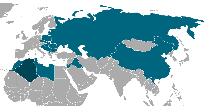 Carte montrant les pays dans lesqulles l'équipe du FLN de football est passé durant sa tournée entre 1958 et 1962.